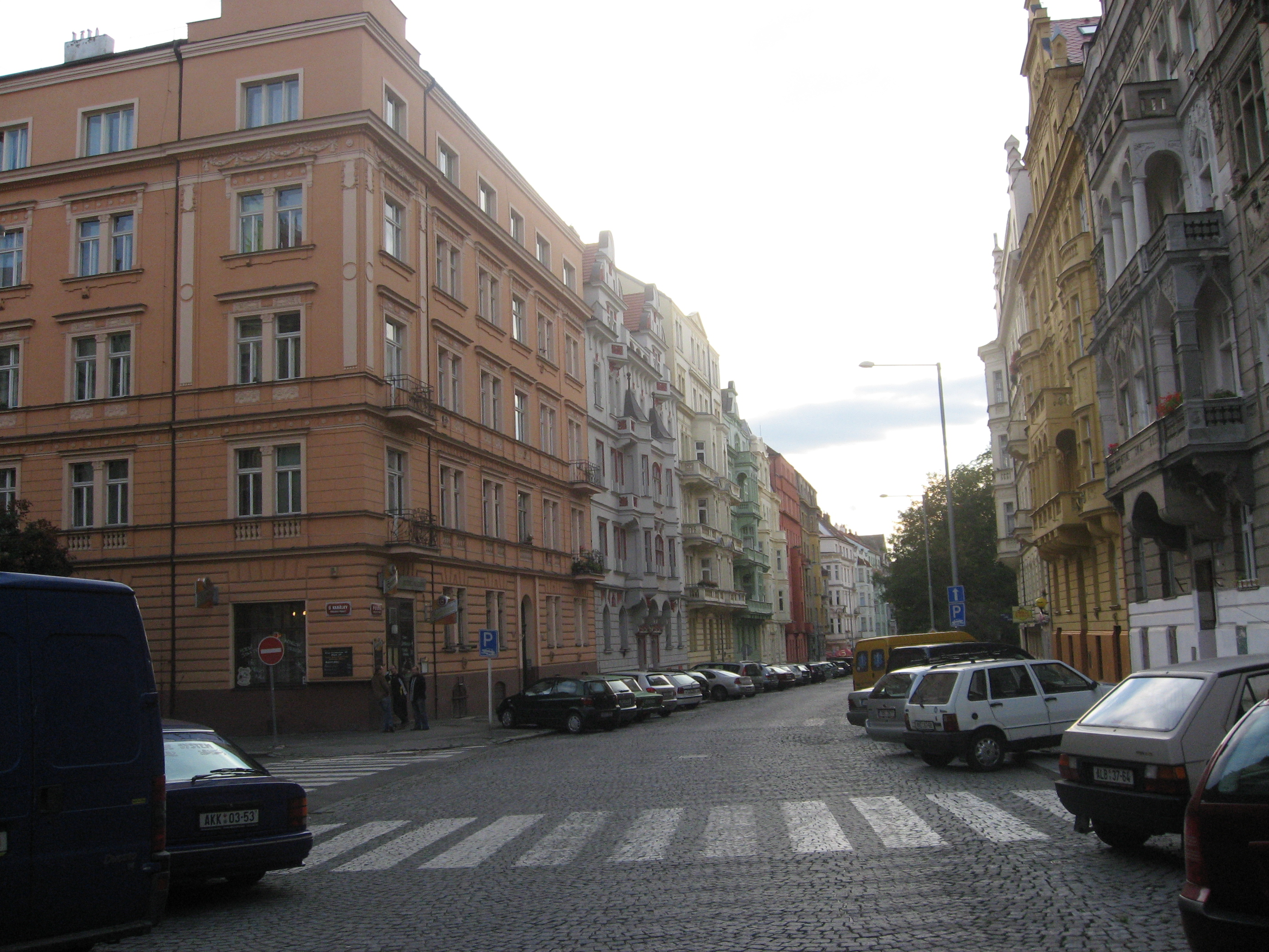 ulice Polská